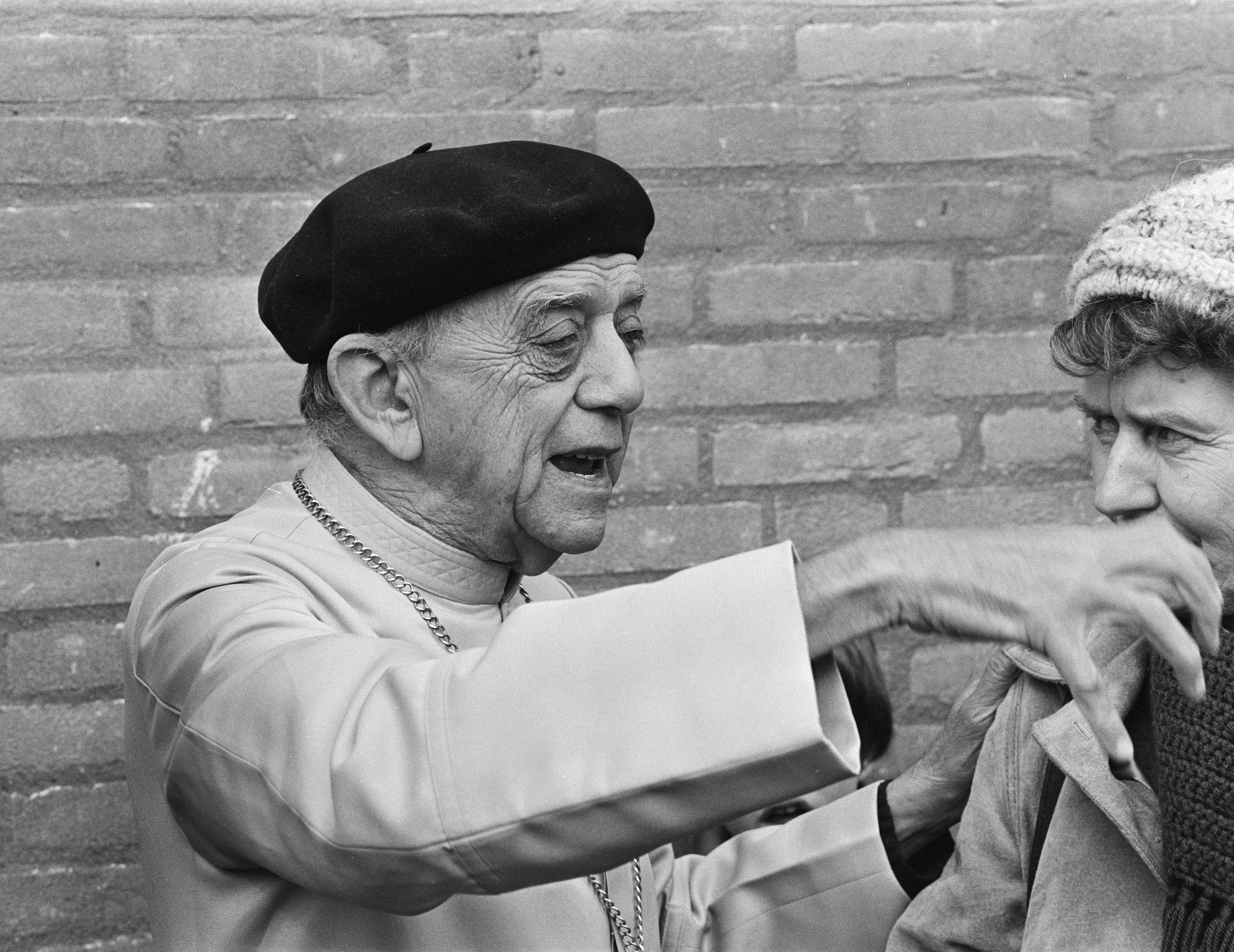 De Braziliaanse aartsbisschop Dom Helder Camara onthult de straatnaamborden in een naar hem vernoemde straat in Delft